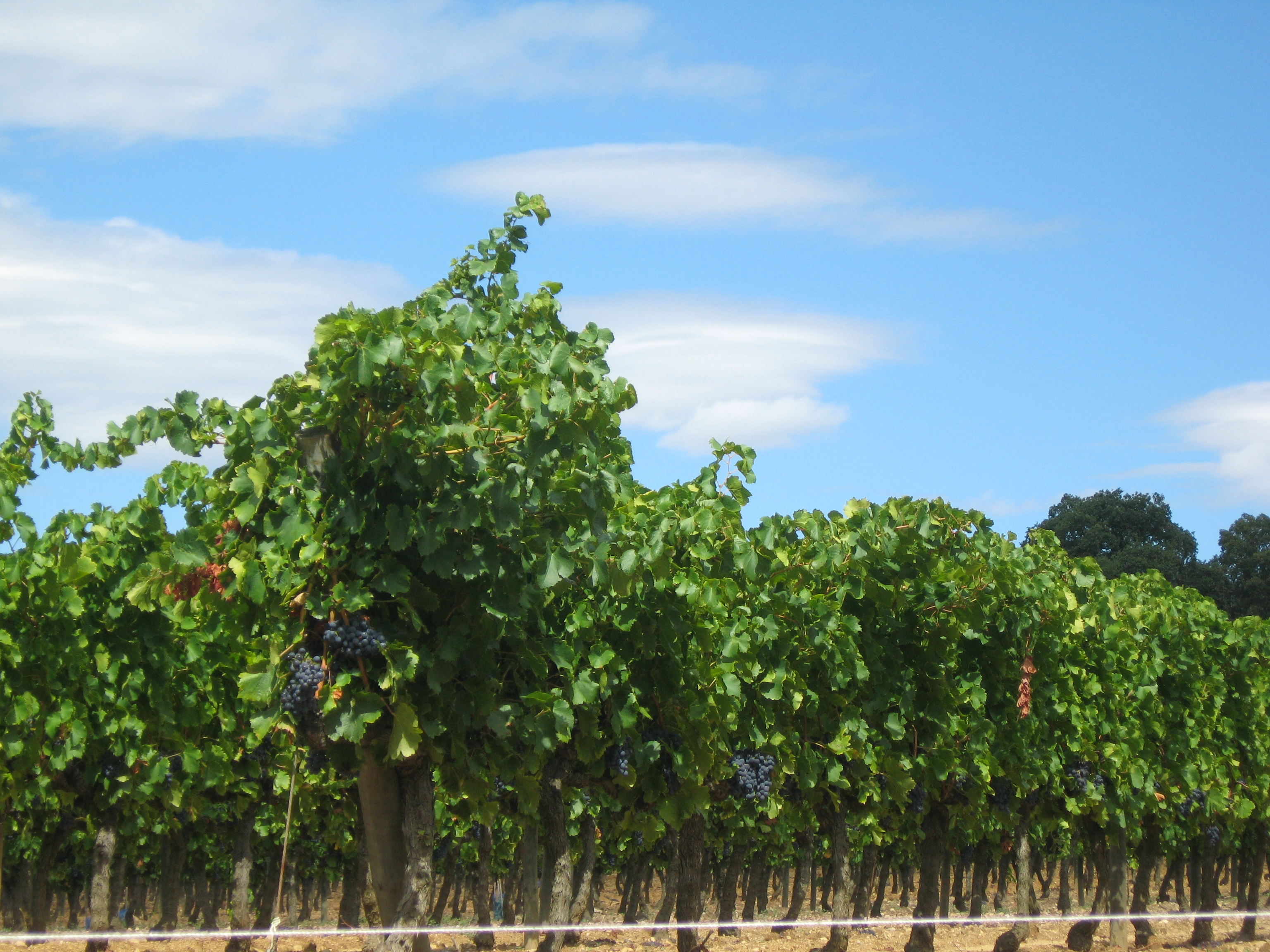 Weinstöcke und Reben bei Capmany (Spanien/Katalonien) Datum 08.09.2010 Urheber: Michael Pfeiffer alias Benutzer:Gordito1869 Quelle: privates Fotoarchiv des Urhebers